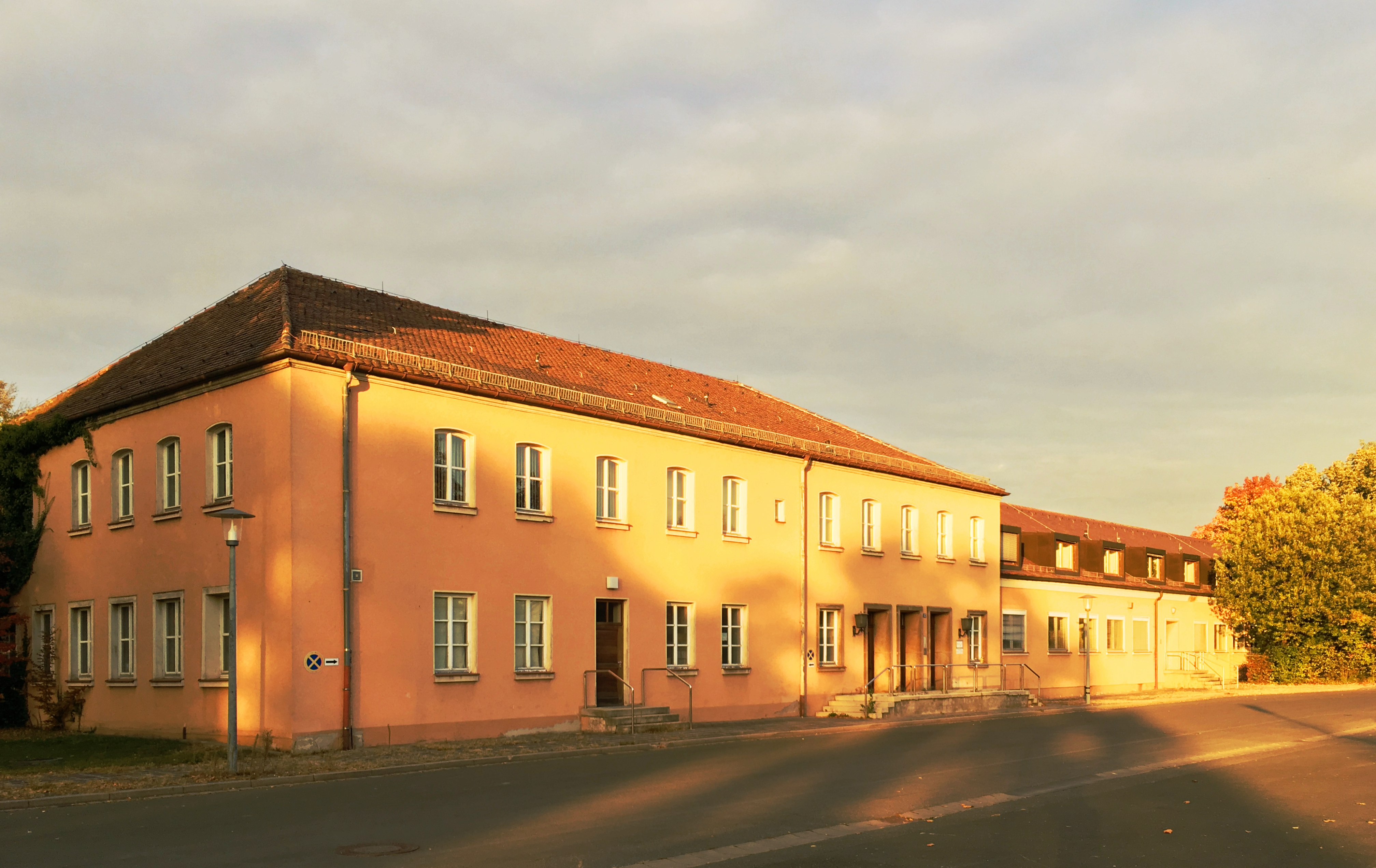 SÖR-Betriebshof auf dem Areal des ehemaligen